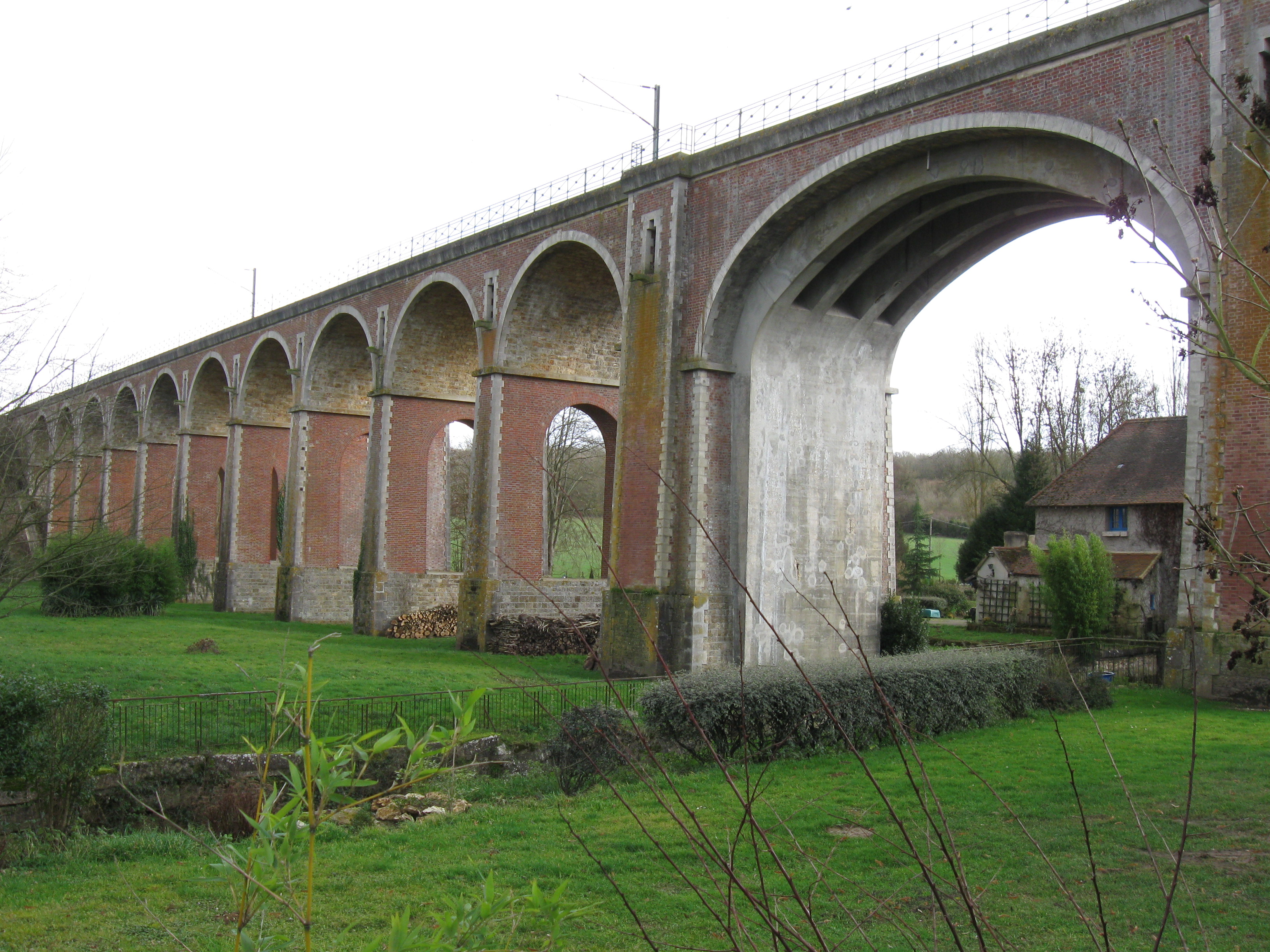 Viaduc ferroviaire de l'Aubetin. En arrière plan, le moulins du Gué-Plat. (département de la Seine-et-Marne, région Île-de-France).